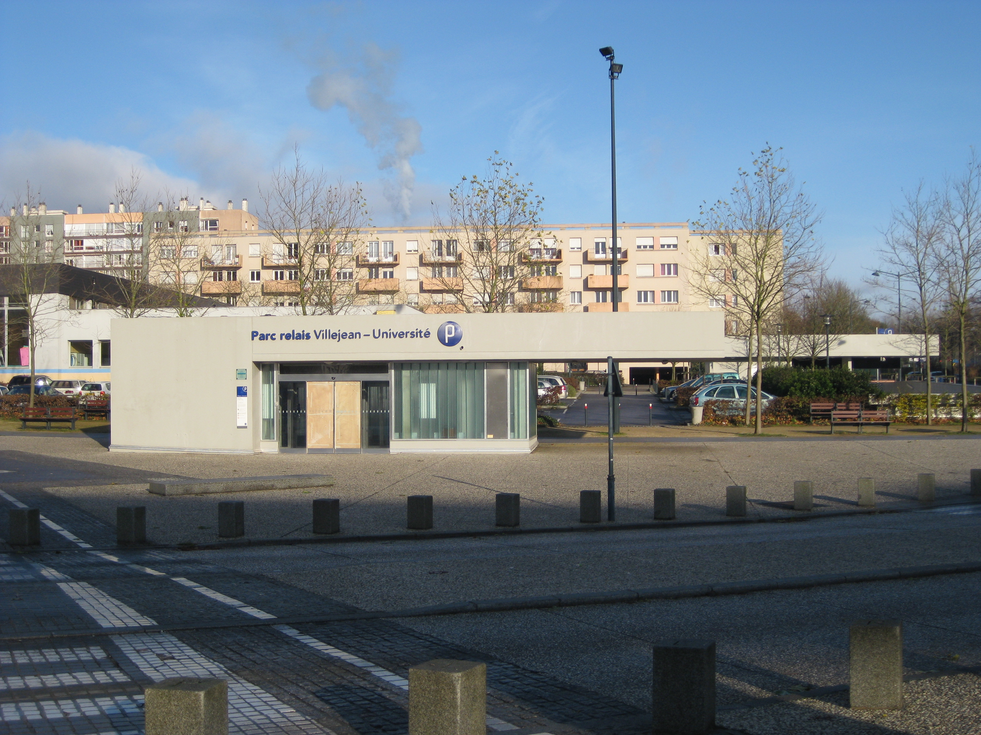 Entrée piétons du parking relais